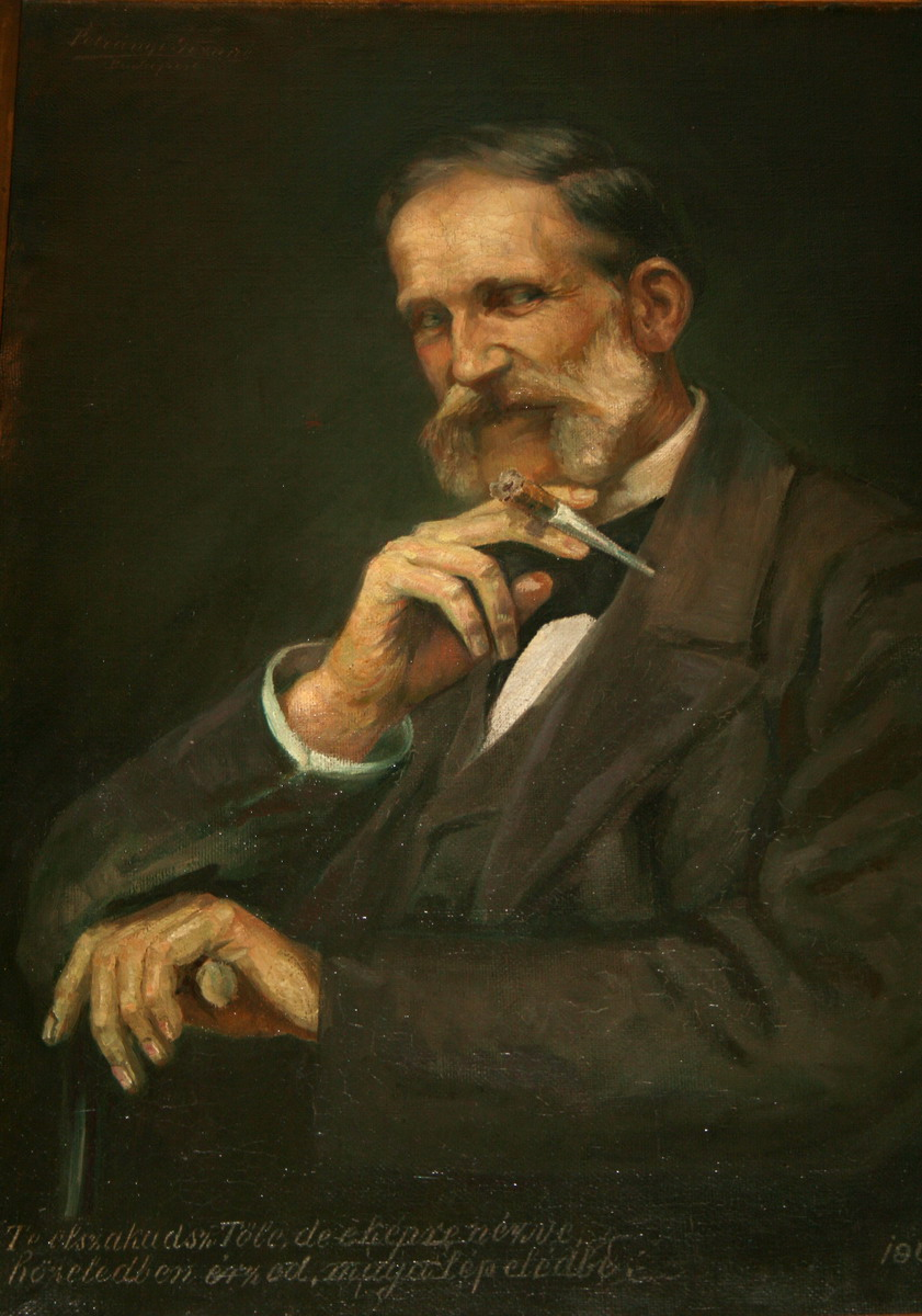 Beöthy Zsolt magyar irodalomtörténész, esztéta, egyetemi tanár, a Magyar Tudományos Akadémia tagja.